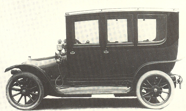 Fiat Tipo 1A Sedan (1912)